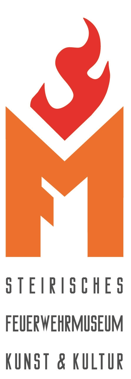 Logo FM